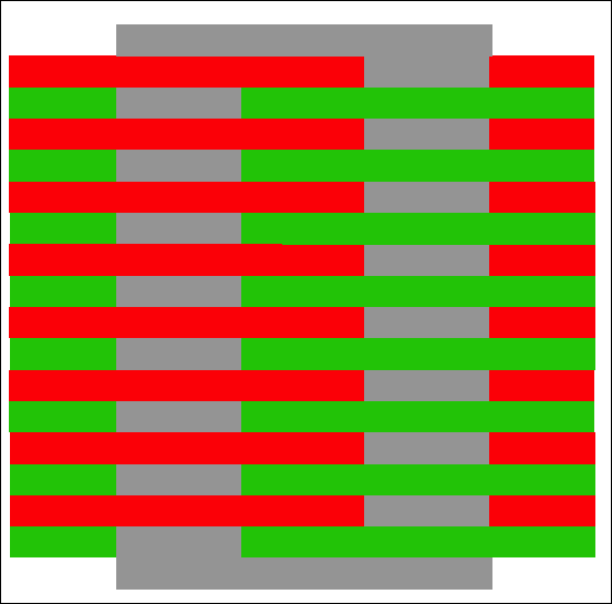 Nach den Regeln des Simultankontrastes müsste das durch die bunten Streifen geflochtene graue Band links grünlich erscheinen, da die Umgebung rot ist. Tatsächlich erscheint es im Vergleich zum rechten grauen Band rötlich gefärbt. Das liegt daran, dass sich eine Farbe ihrer Umgebung angleicht, wenn kleiner Farbflächen eingestreut sind.